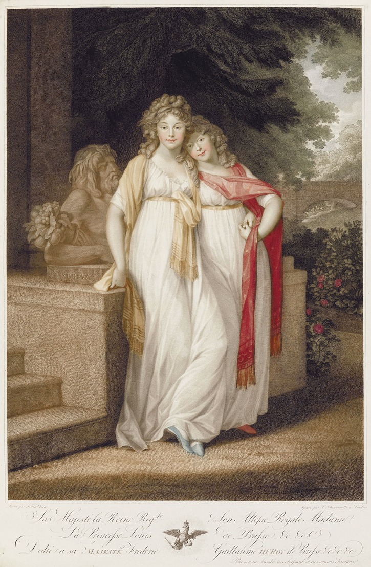 Luise (spätere Königin von Preußen) mit ihrer Schwester Friederike in einer Parklandschaft. Kupferstich in Braun. 60,4 x 42,2 cm. Peint par F. Tischbein. Gravé par L. Schiavonetti à Londres. A Mannheim chez Dom. Artaria.